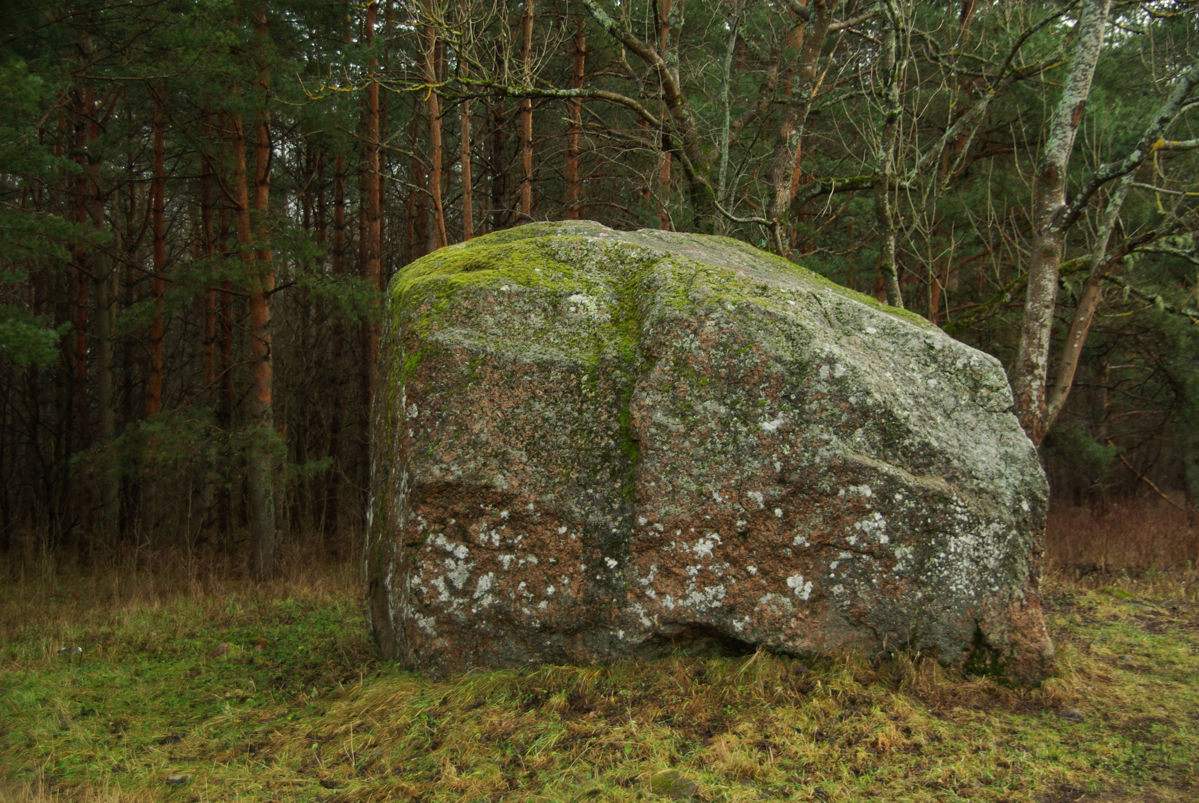 Tallinn,Nõmme-Mustamäe maastikukaitsealal,Kuusiku parkmetsas.